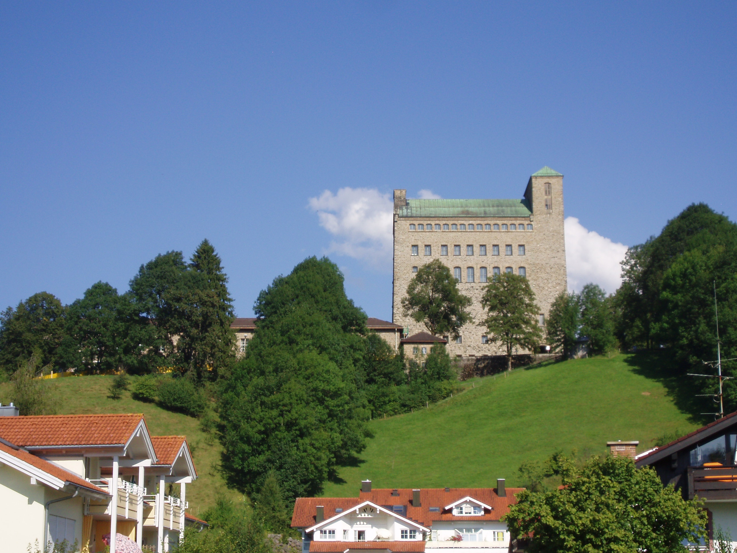 Ordensburg in Sonthofen